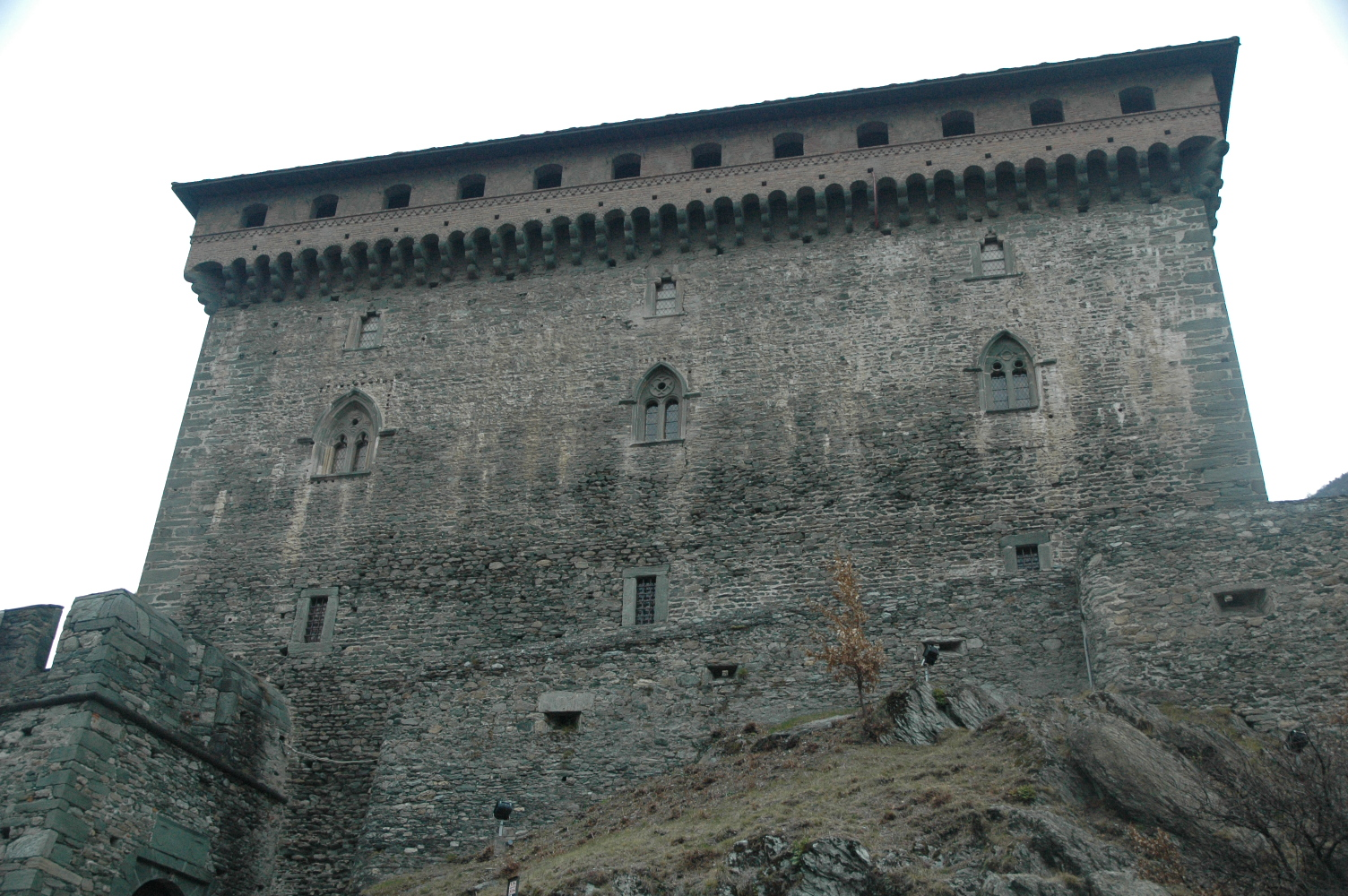 Castello di Verres da sud